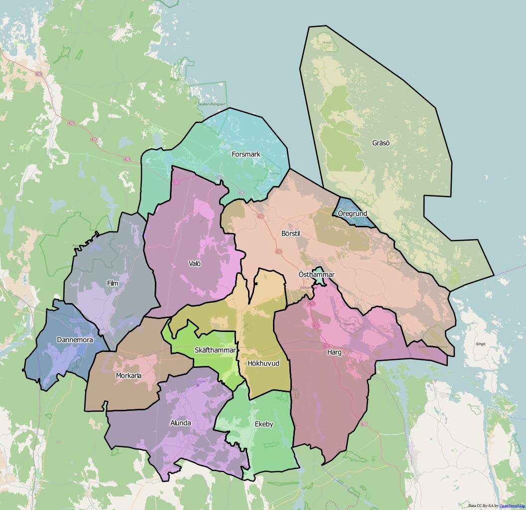 Distriktsindelningen i Östhammars kommun World file 127.19251321907995589 0 0 -127.19251321907995589 1964962.058328652754426 8527590.30262298509478569